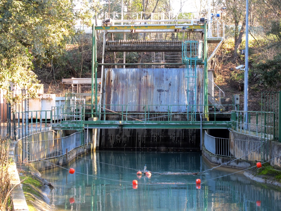 Entrée du souterrain conduisant le canal vers Marseille par dessous la colline des Cadeneaux.